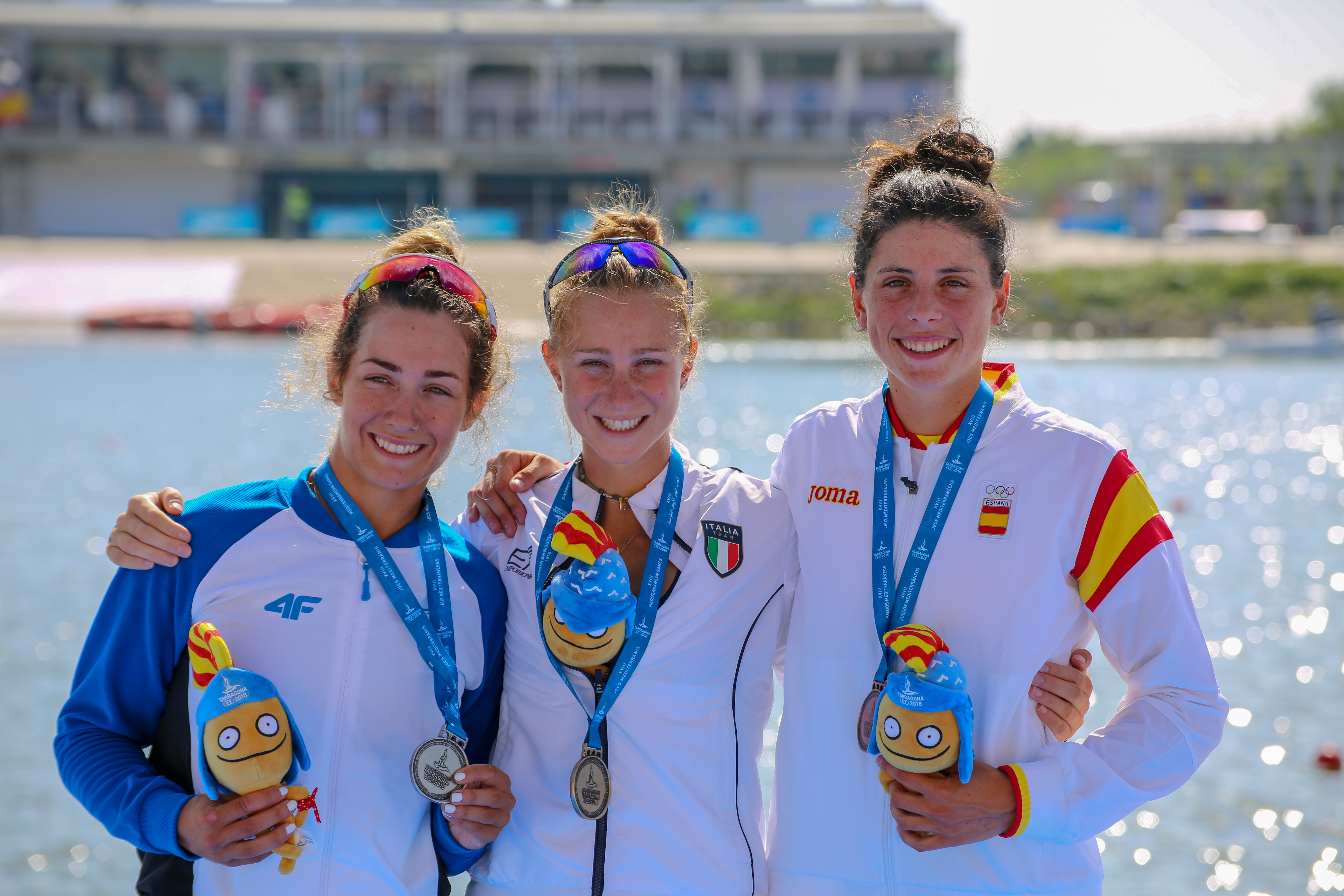 Medallistas del LW1x en los Juegos del Mediterráneo 2018